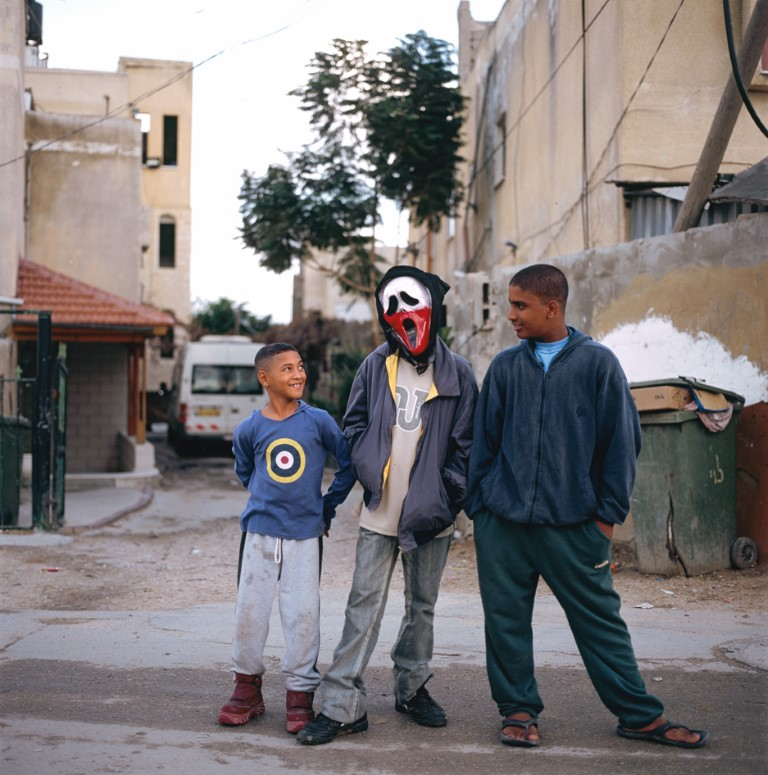 Installation